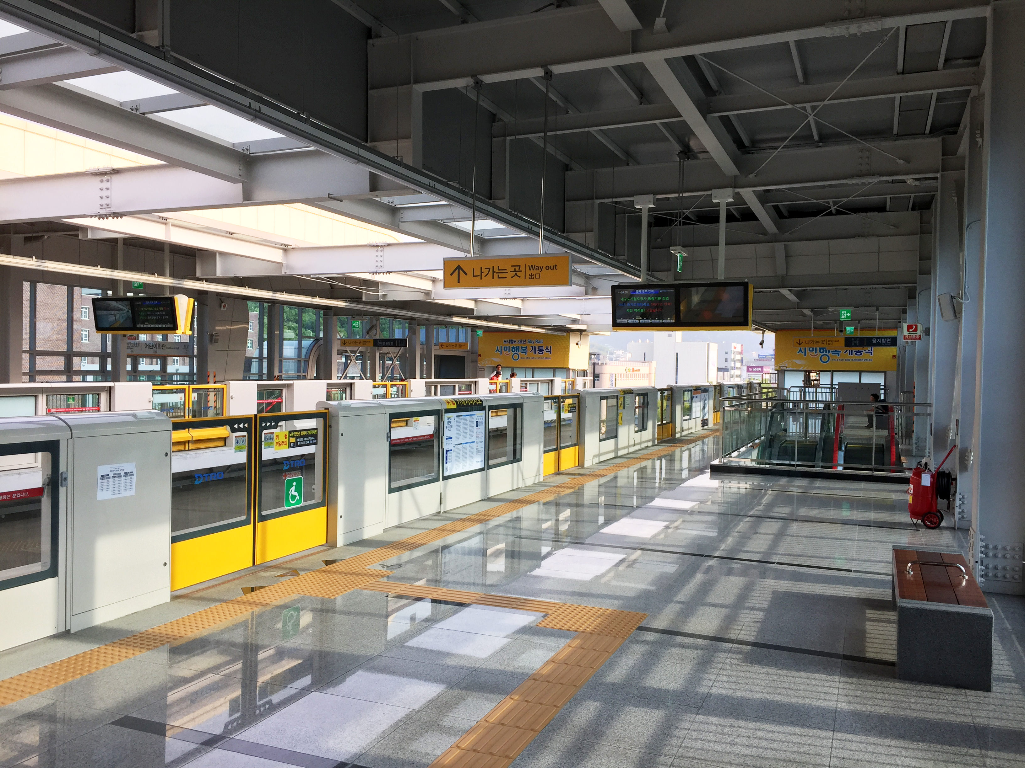 어린이회관역 승강장